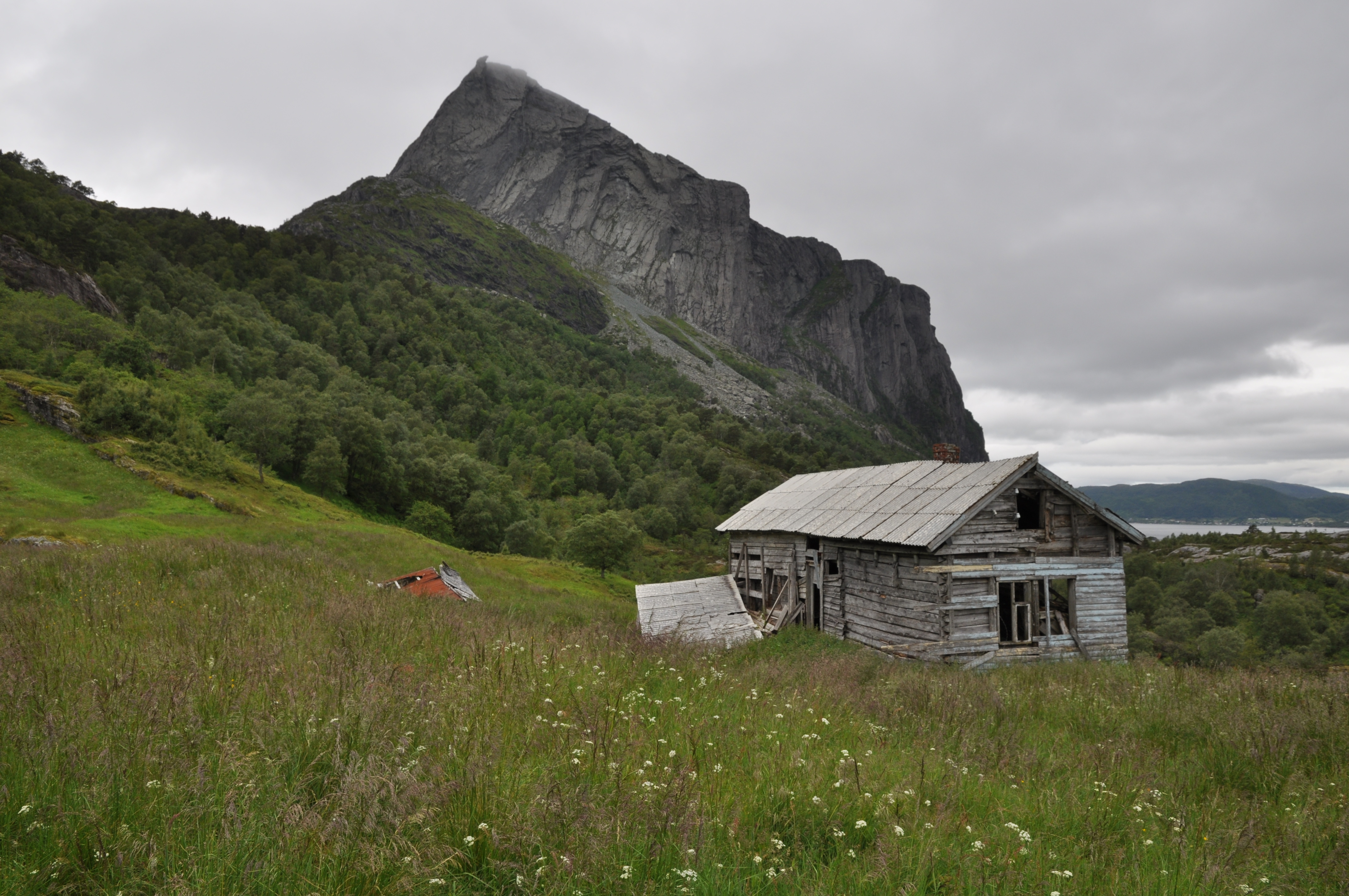 Biletet er teke frå den nedlagde garden Rinde i Hyllestad kommune i Ytre Sogn. Det viser gardshus og den austre enden av Lihestplatået. Fjelltoppen på biletet er Gygrekjeften, 710 moh.